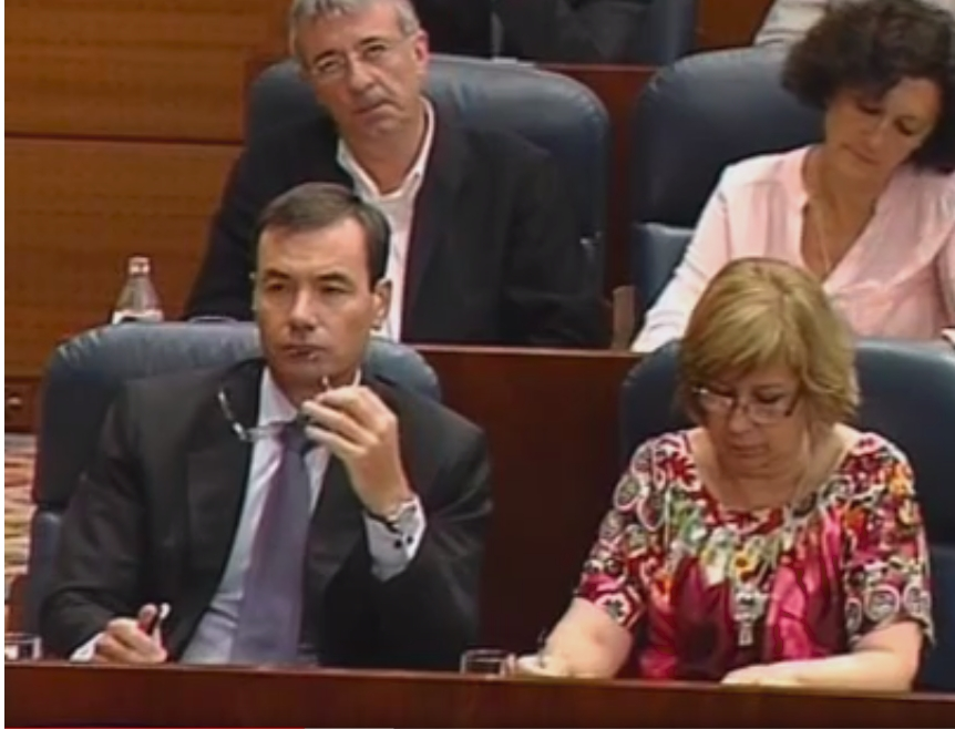 El Presidente de la Comunidad de Madrid, Ignacio González, comparece ante el Pleno de la Asamblea de Madrid, donde pronunciará el discurso inaugural del Debate sobre el Estado de la Región